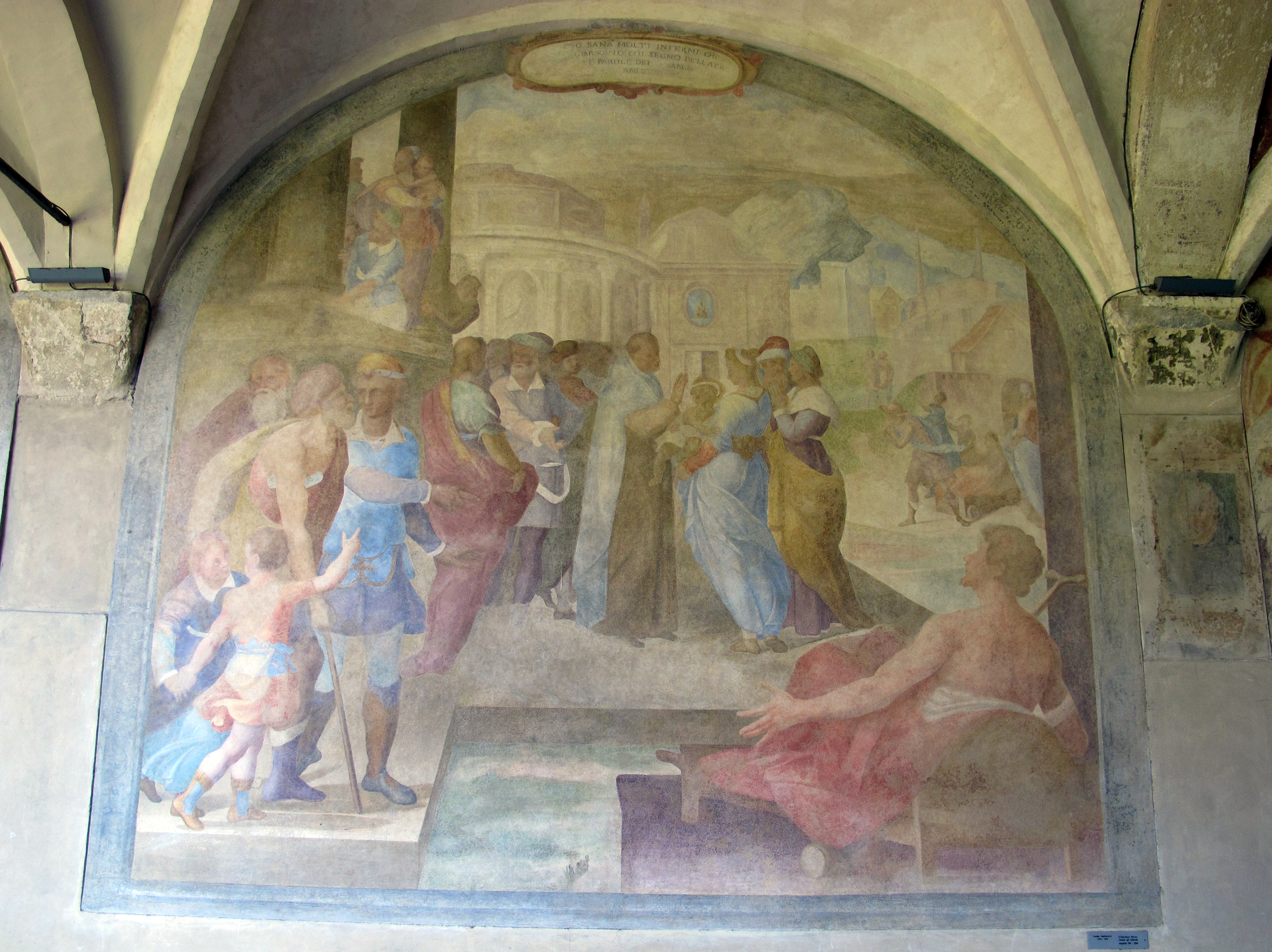 Affreschi nel Chiostro Grande in Santa Maria Novella